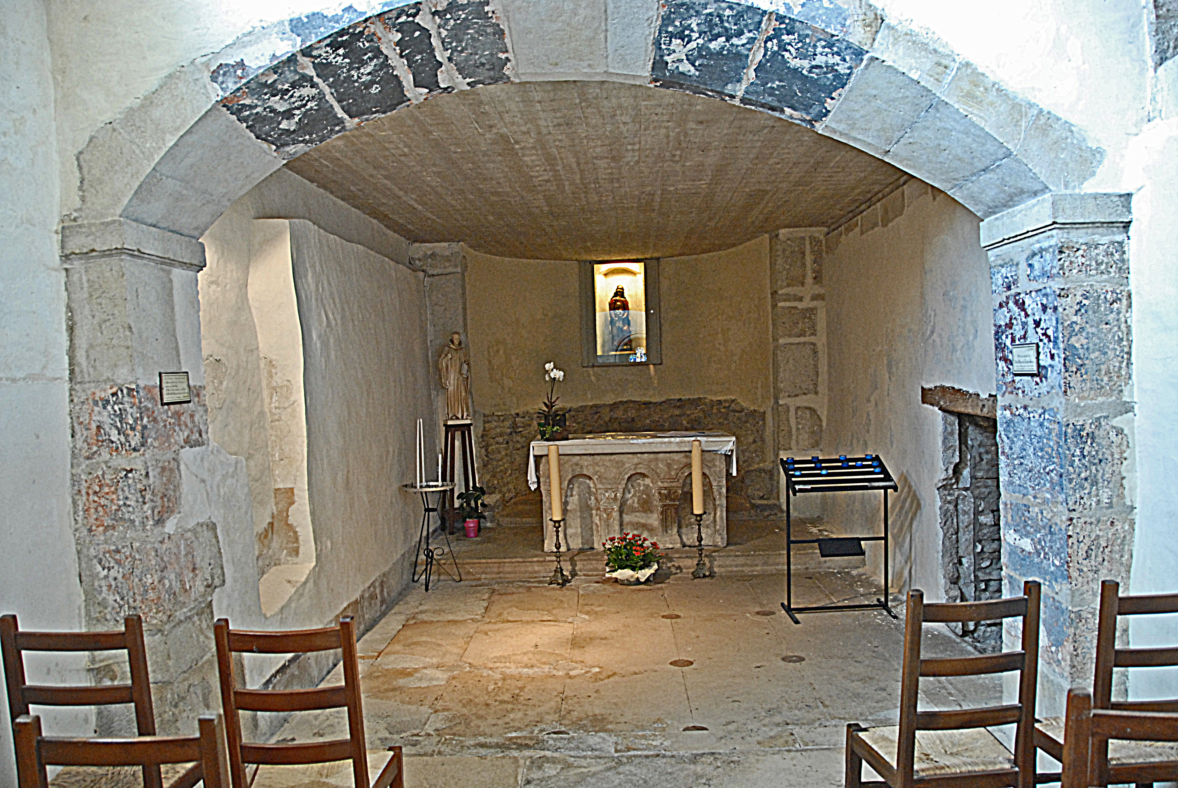 St-Vorles de Châtillon-s-S, St-Brenard-Kapelle